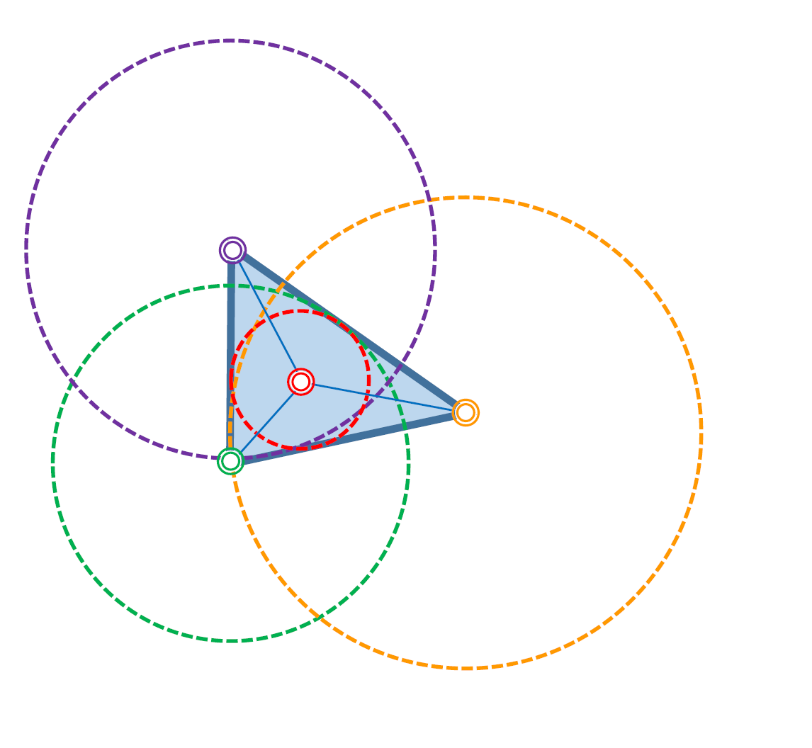 Circungono triangular. Si se trata de un triángulo acutángulo, puede considerarse circungonal" a cuatro círculos